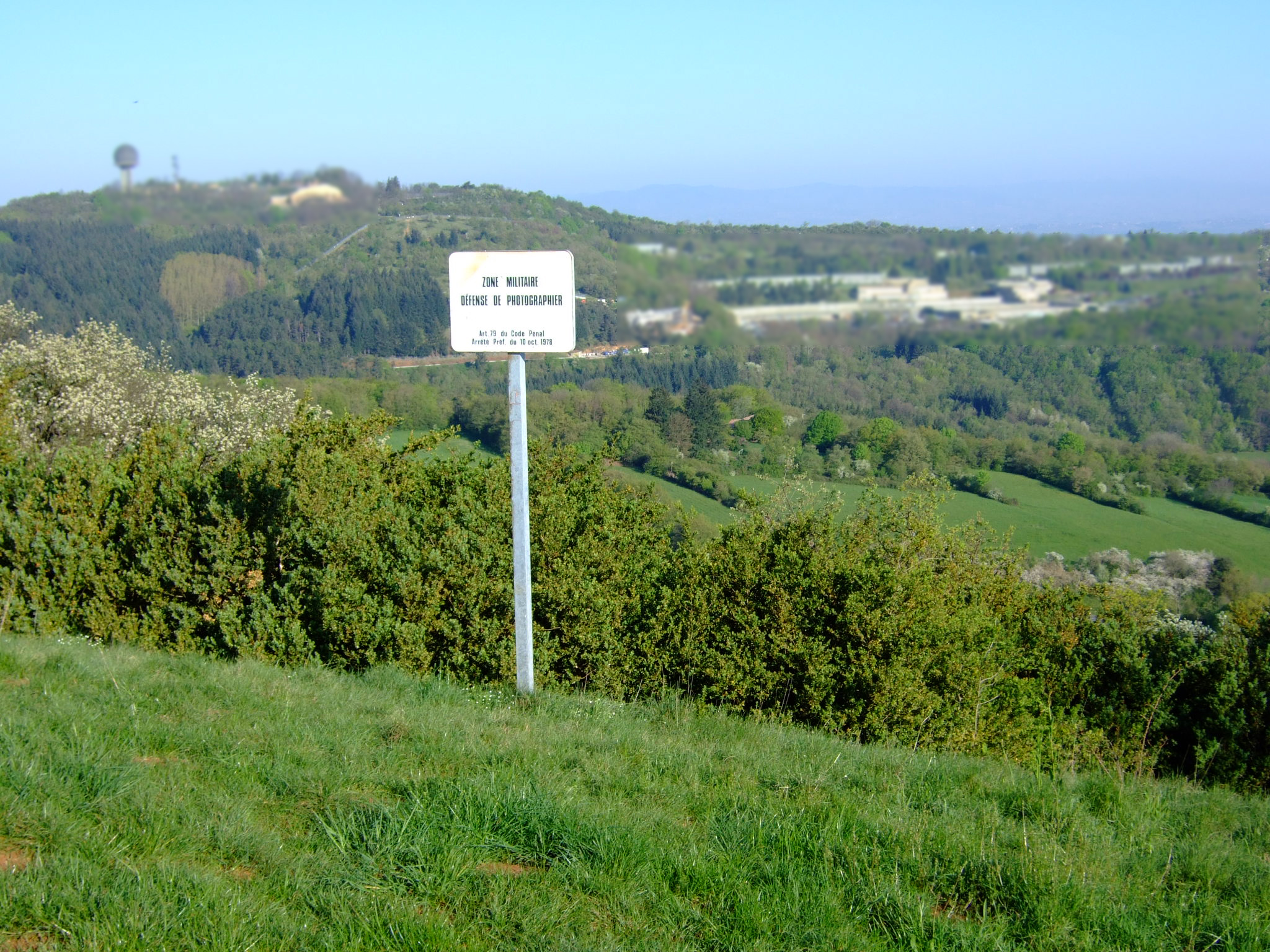 La base aérienne 942 au Mont-Verdun, vue depuis le Mont Thou